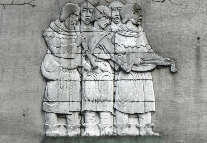 wypukłorzeźba - rzeźbiarz Edmund Mikołaj Majkowski